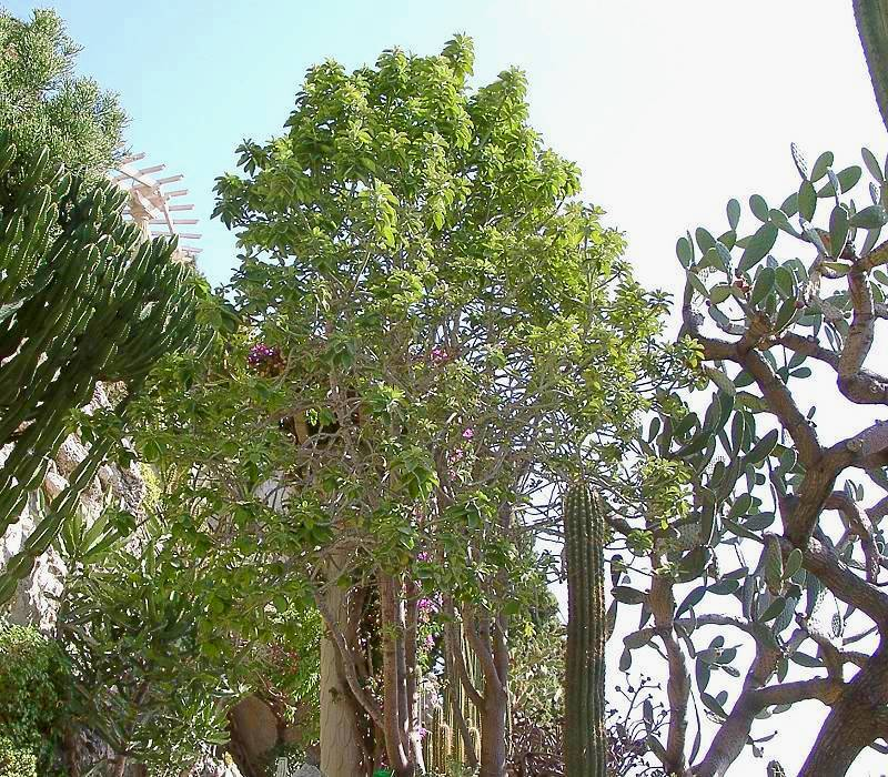 Euphorbia bicompacta var. bicompacta Jardin Exotique, Monaco